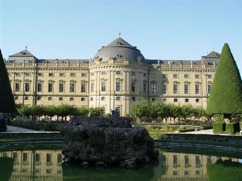 Foto José Gonçalves